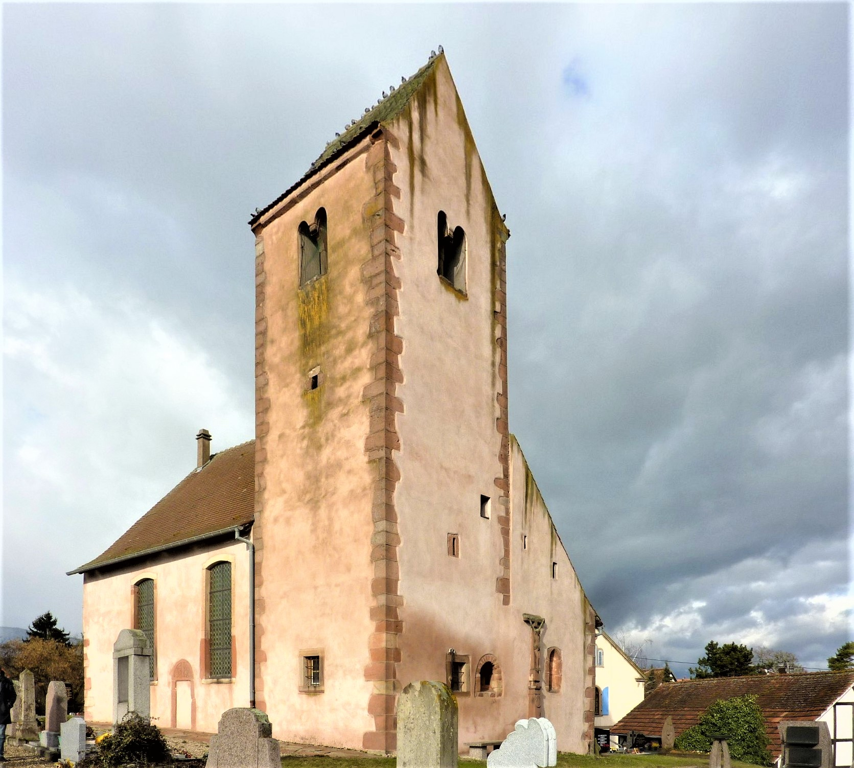 Église Saint-Arbogast (Bourgheim)